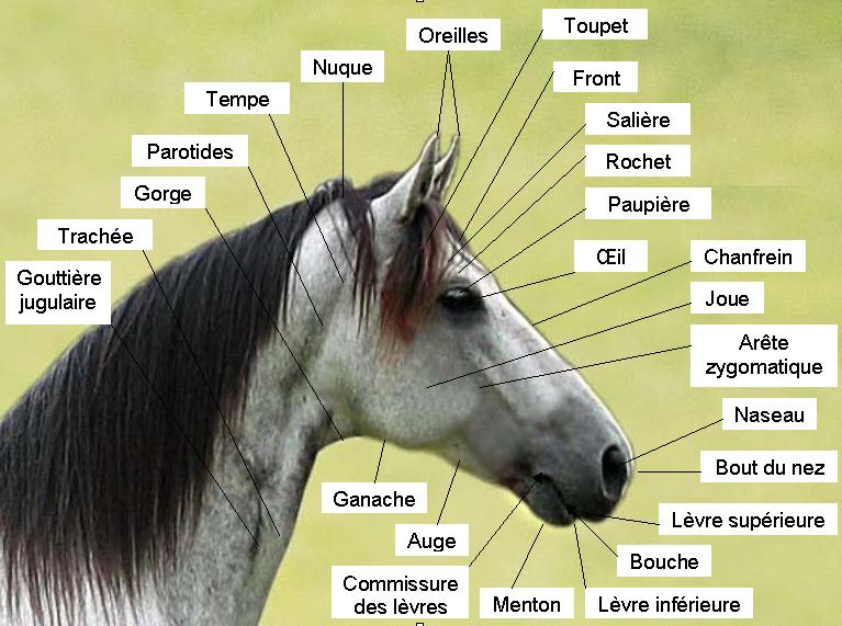 Anatomíade une cabeça de um Mangalarga Marchador. Bill Vidigal Haras Bomirar